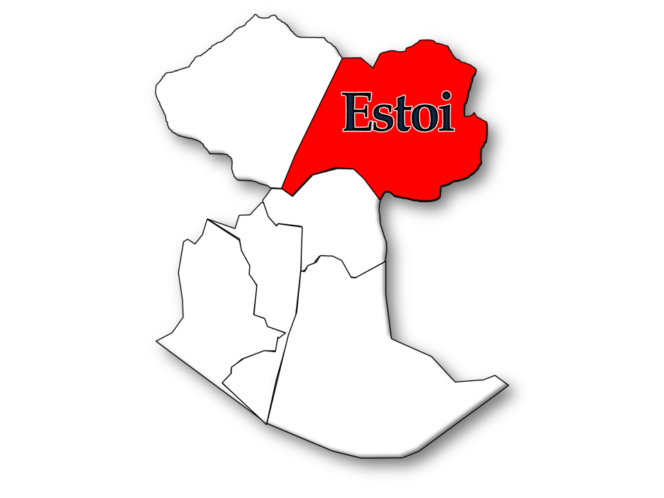 Censos 1864/2011